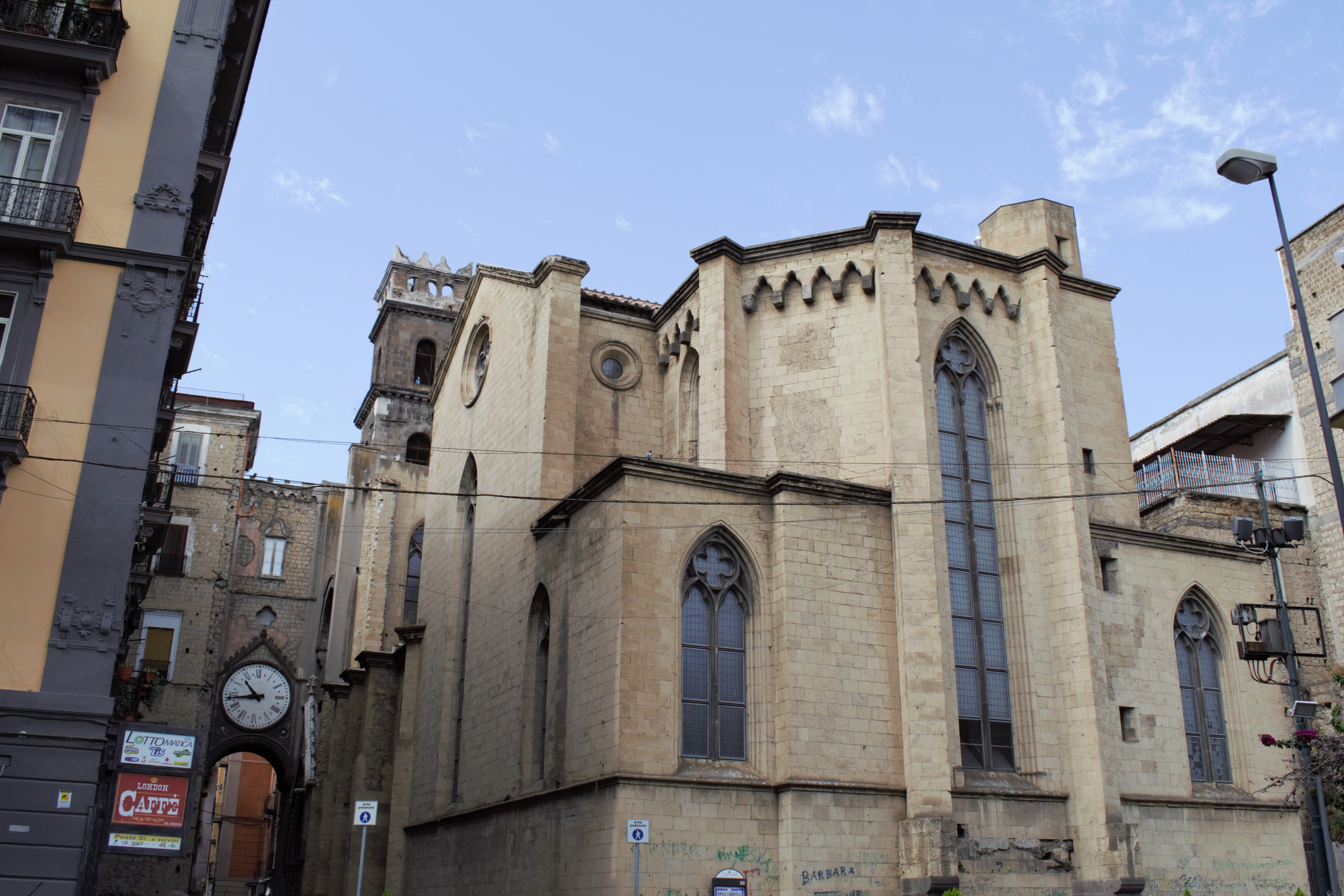 Esterno, Sant'Eligio Maggiore, Napoli